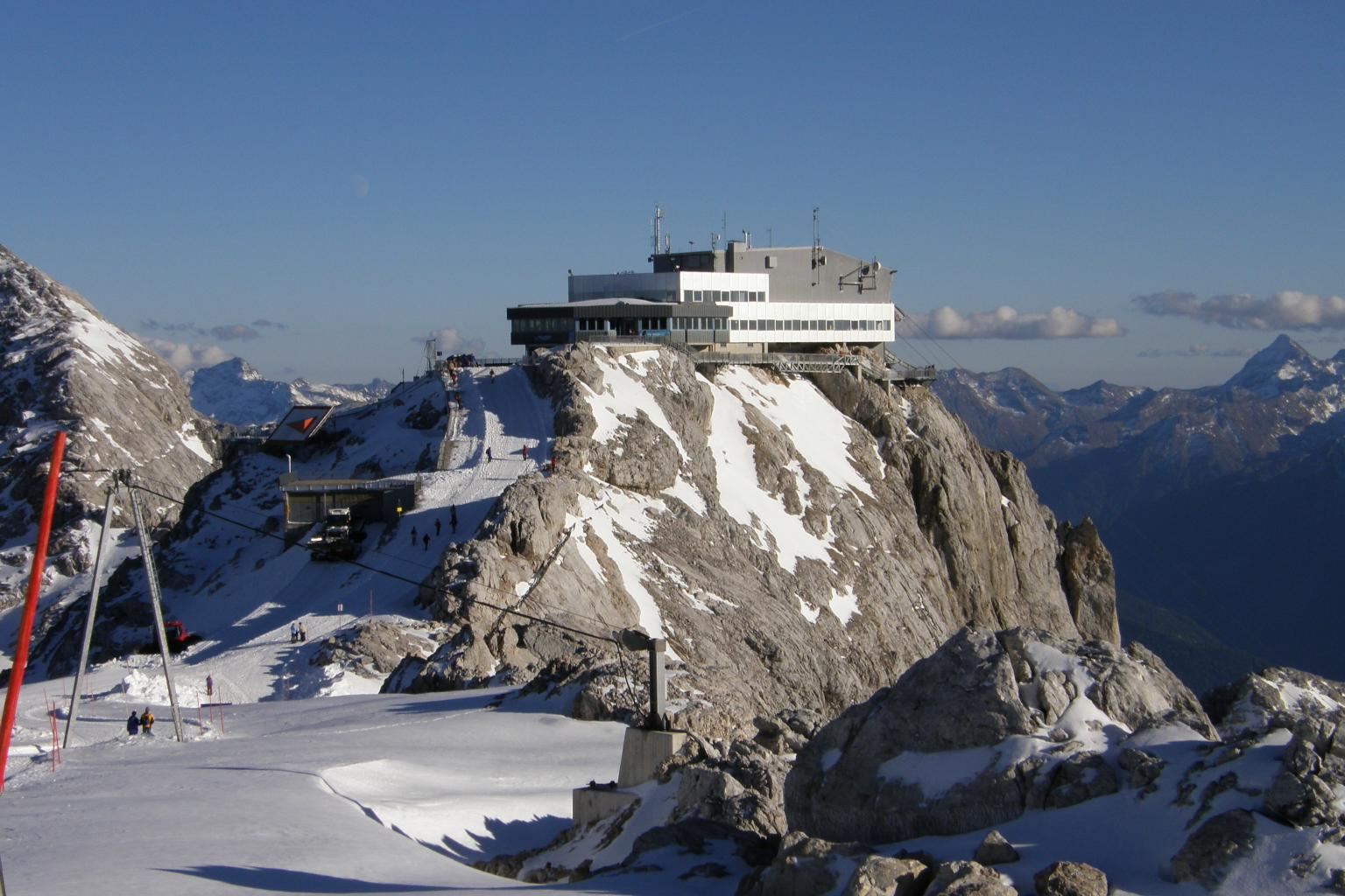 Dachstein, Bergstation, górna stacja - 2700 m